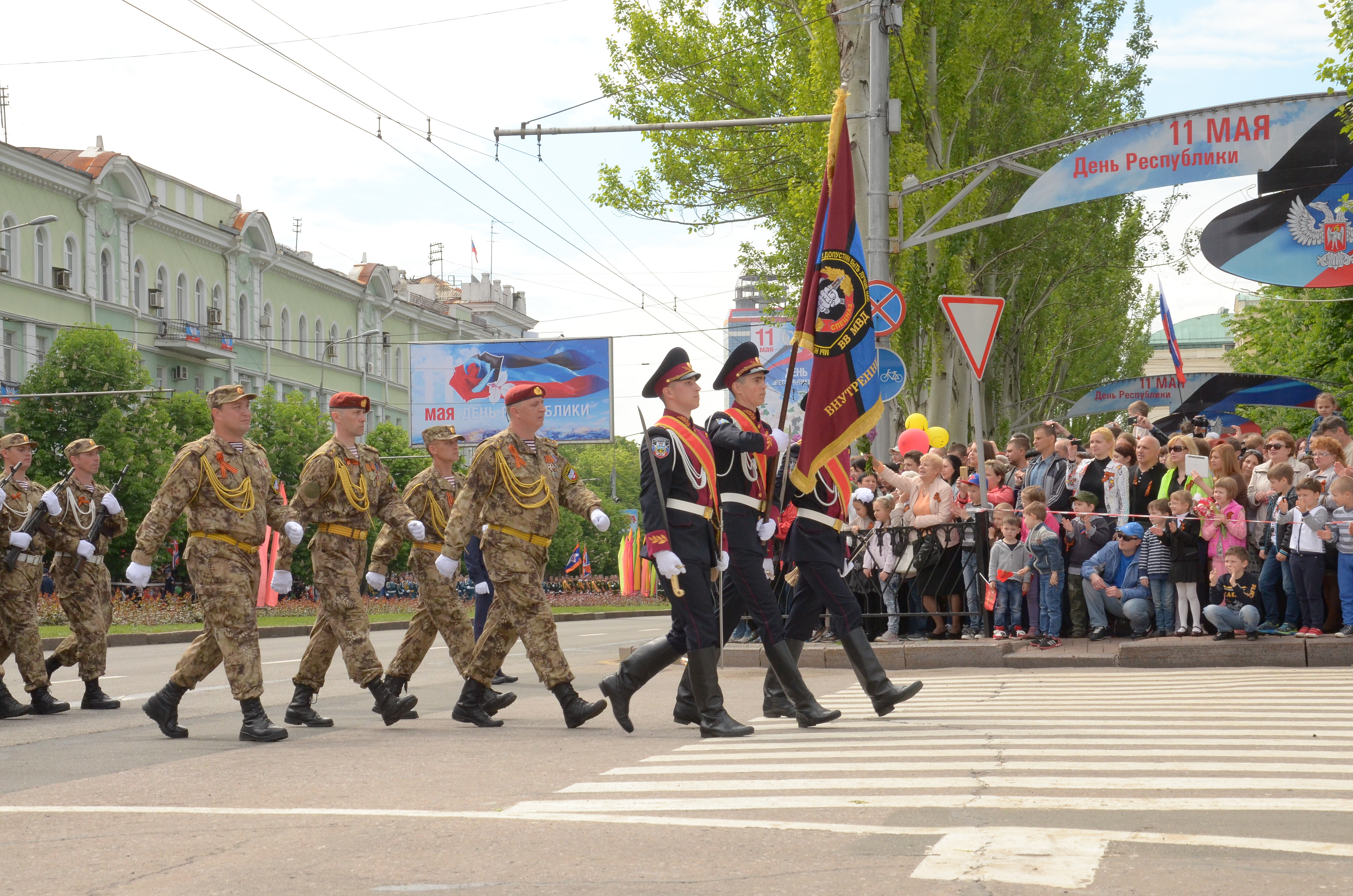 День Победы в Донецке